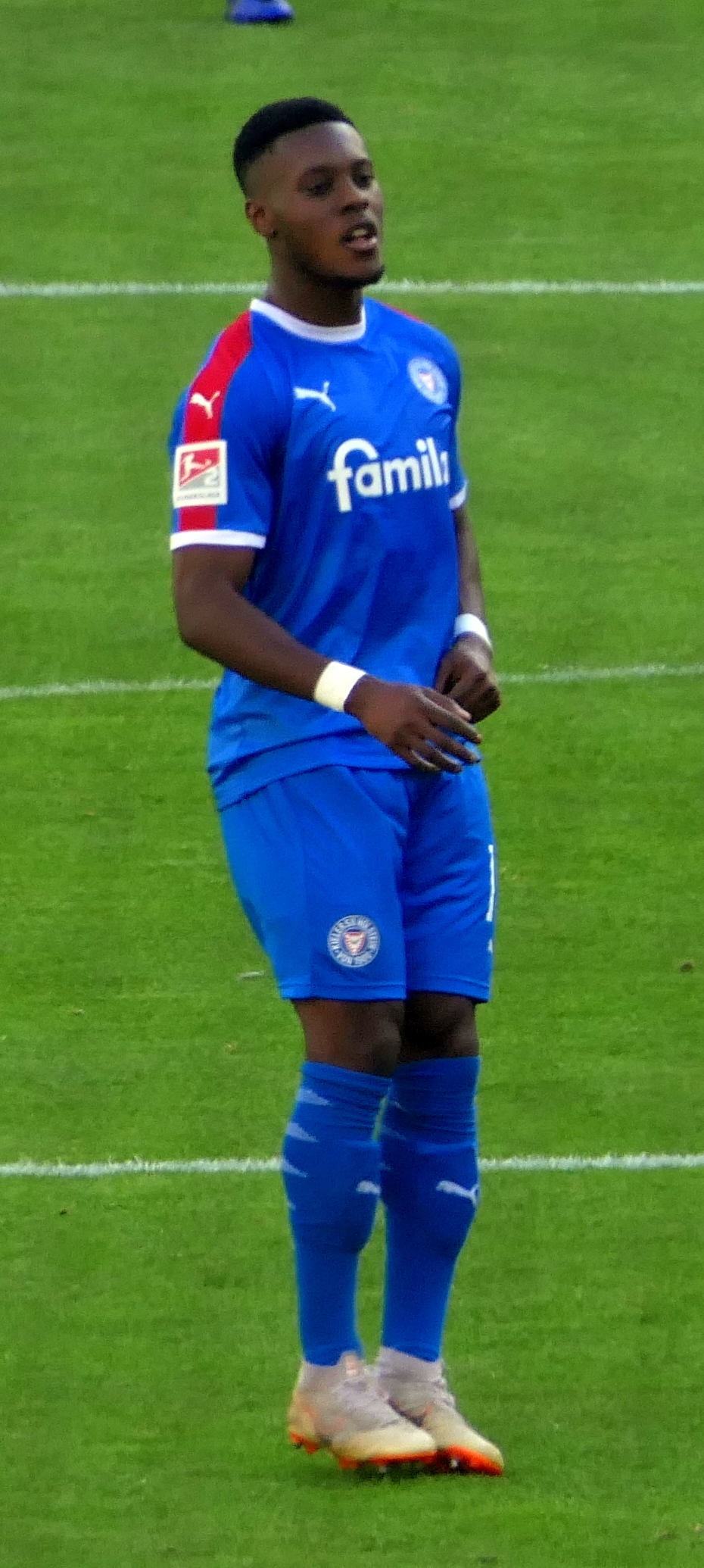 Der Fussballprofi Makana Baku im Trikot von Holstein Kiel beim Auswärtsspiel gegen den VfB Stuttgart am 20.10.2019.